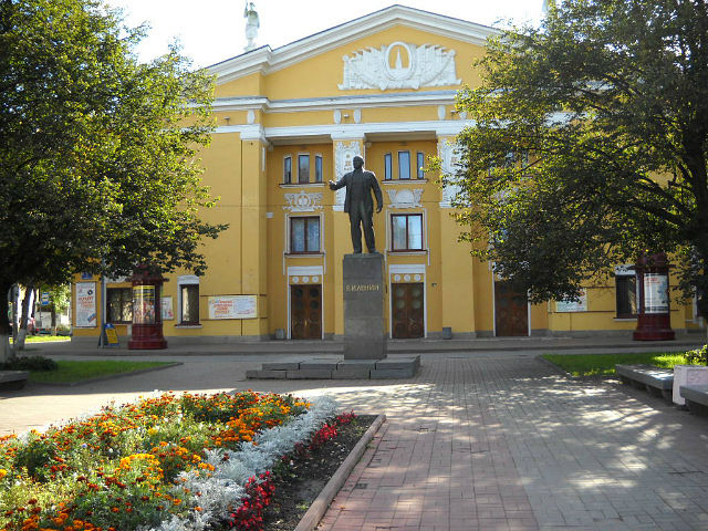 Волховский Городской Дворец Культуры